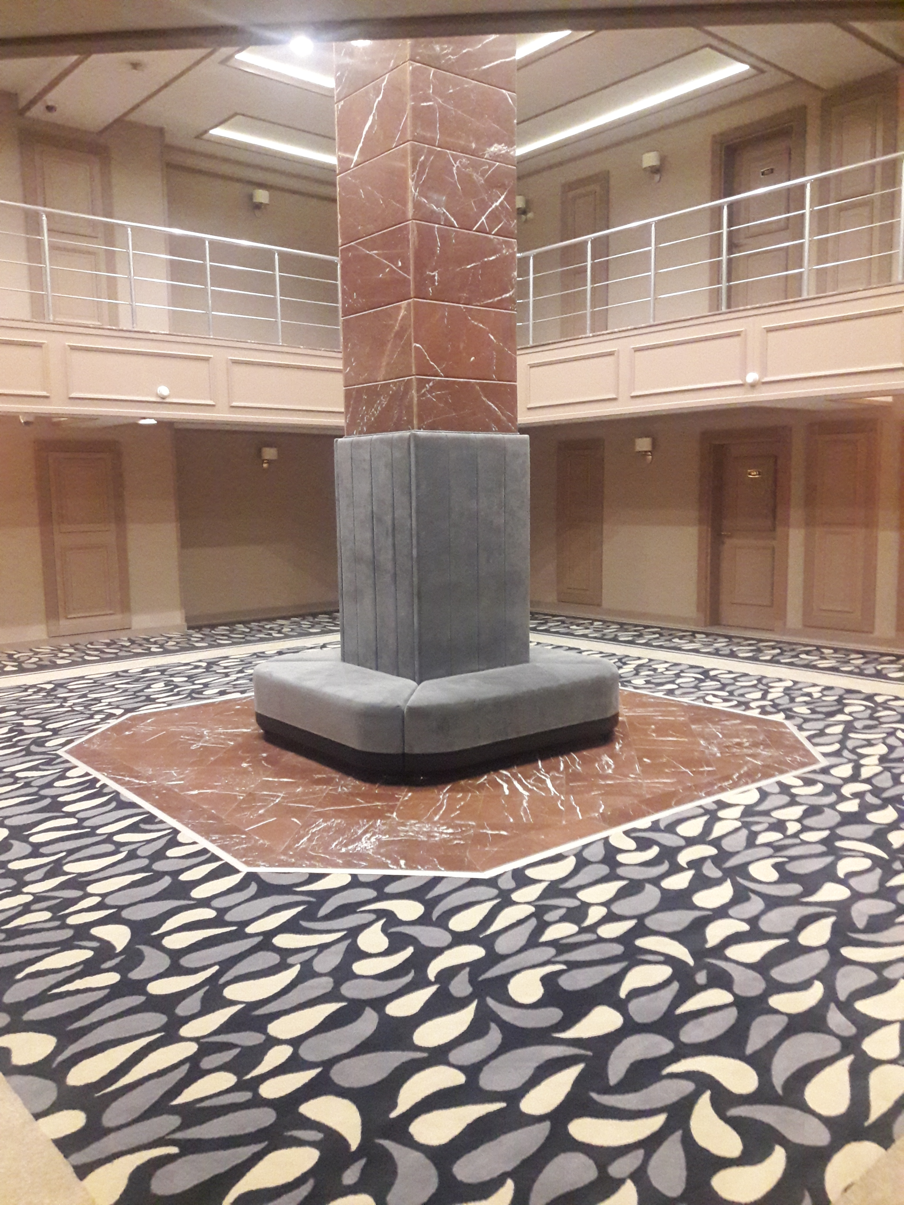 Təbriz mehmanxanasının 6-cı, 7-ci mərtəbəsi